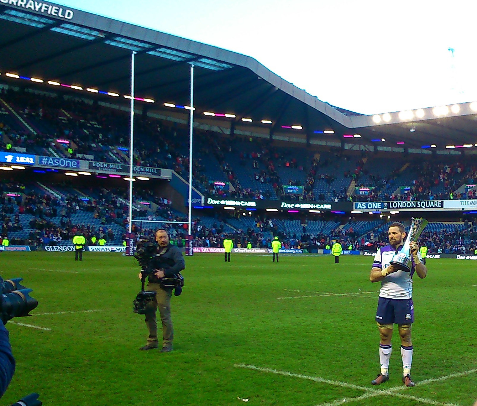 John Barclay and The auld Alliance Trophy 11 Feb 2018